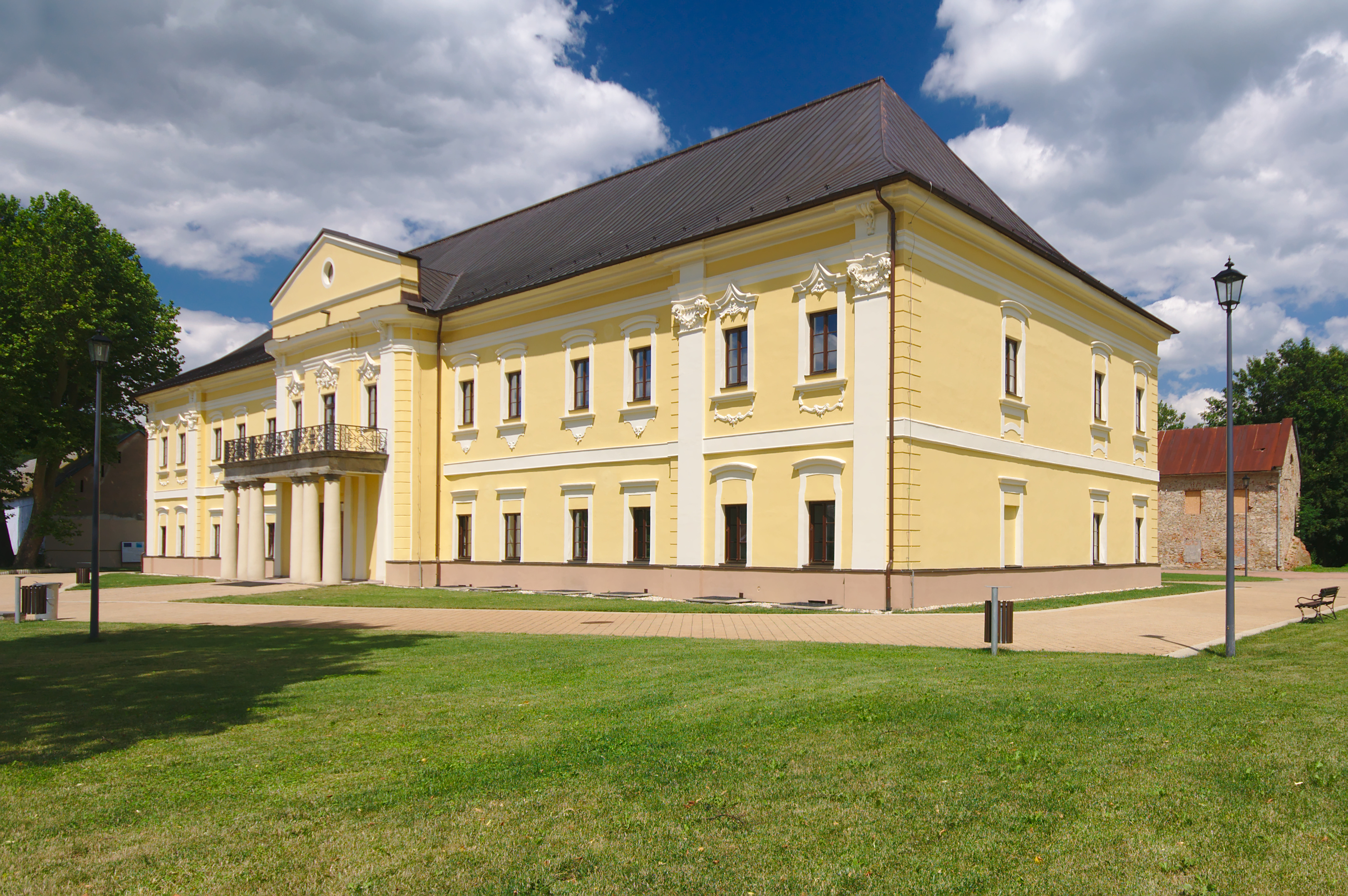 Kaštieľ, Snina